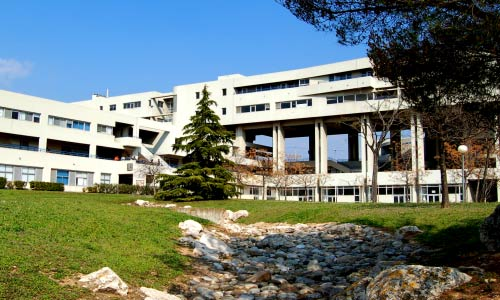 Photo du bâtiment de l'Ecole Centrale Marseille.